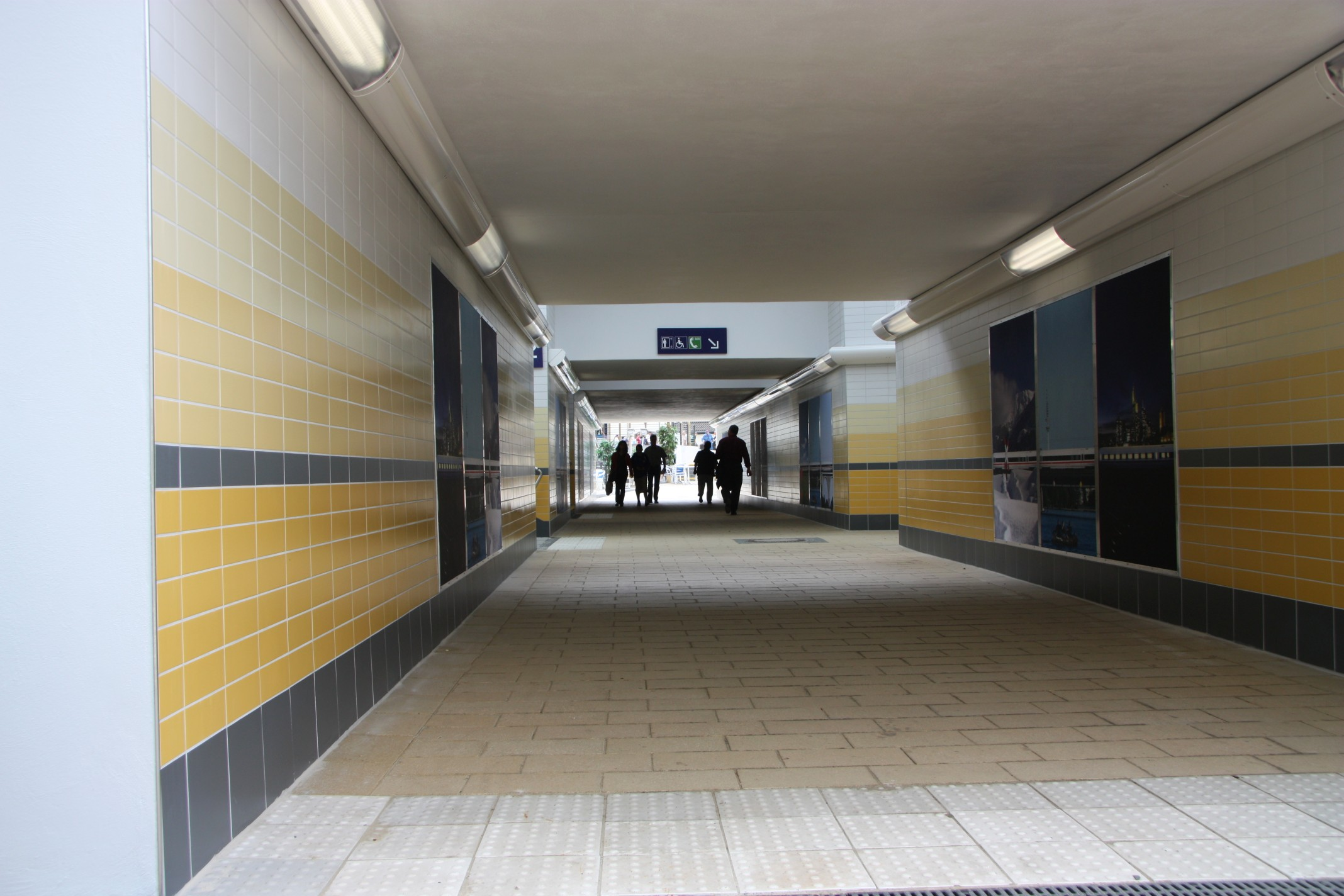 Bahnhof Stadtallendorf, Fußgängertunnel zu den Gleisen, gleichzeitig Verbindung von Niederkleiner Straße und Stadtmitte.